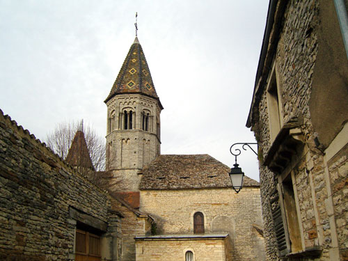 Eglise de Clessé